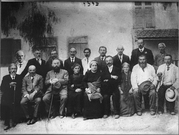 גדרה - חברי בילו